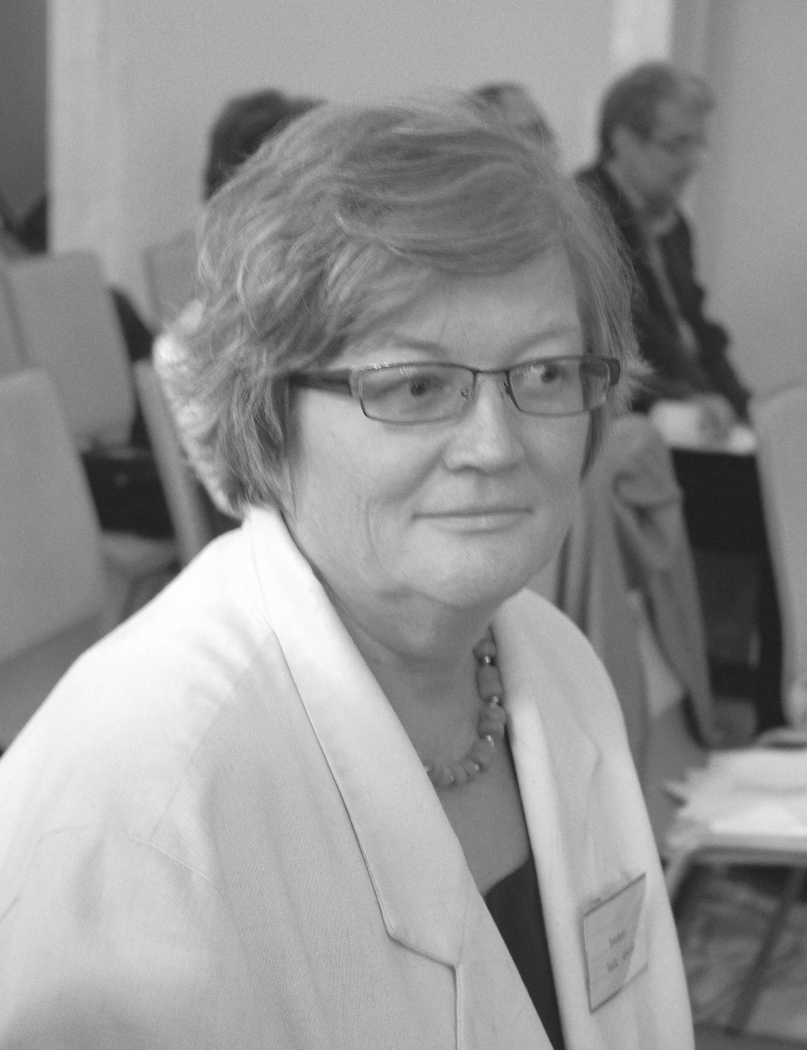 Barbara Sułek-Kowalska - Polish journalst.